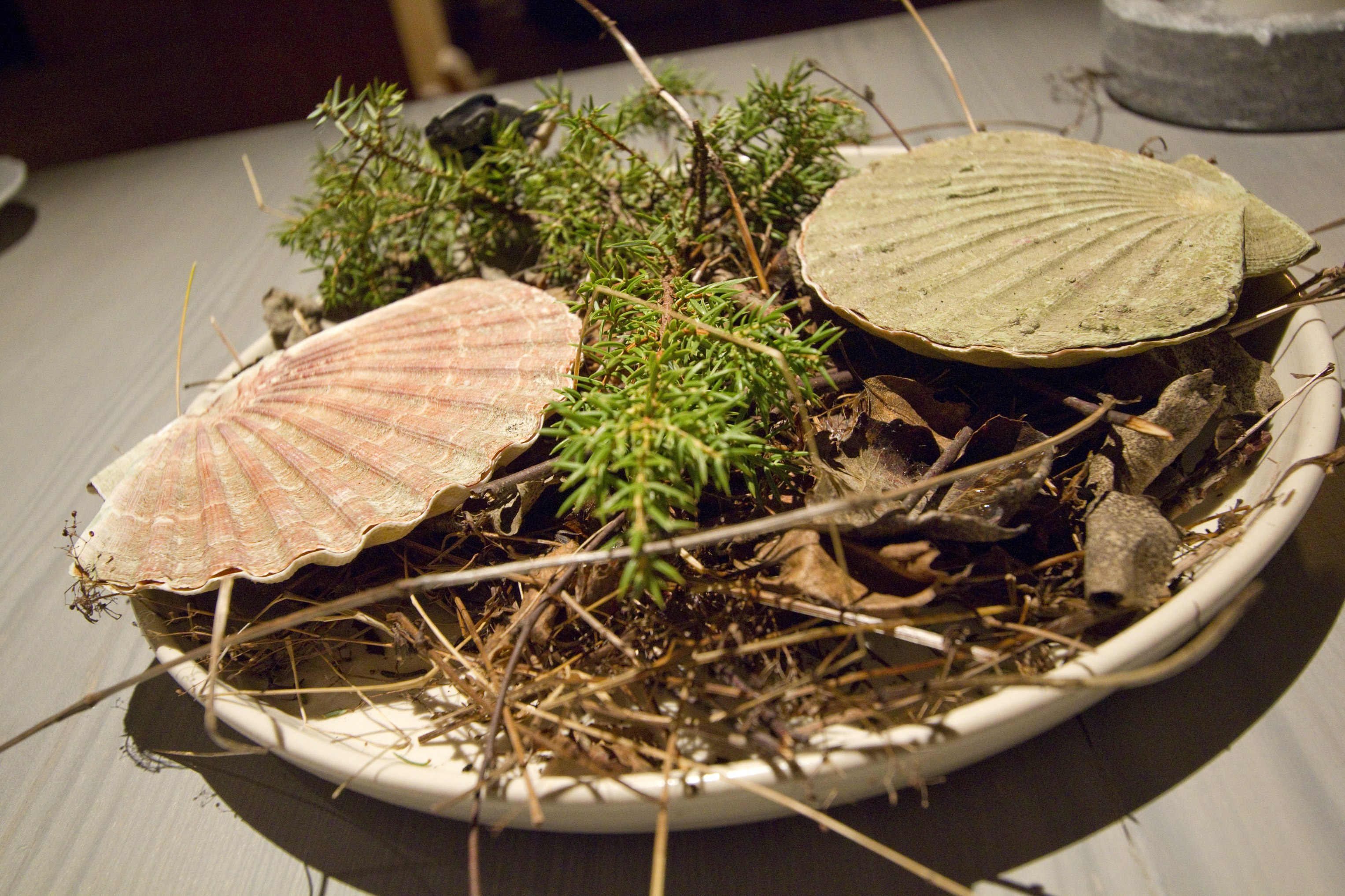 En underbar middag på Fäviken Magasinet. Pilgrimsmussla "I skalet ur elden" Tillagad över brinnande enkvistar